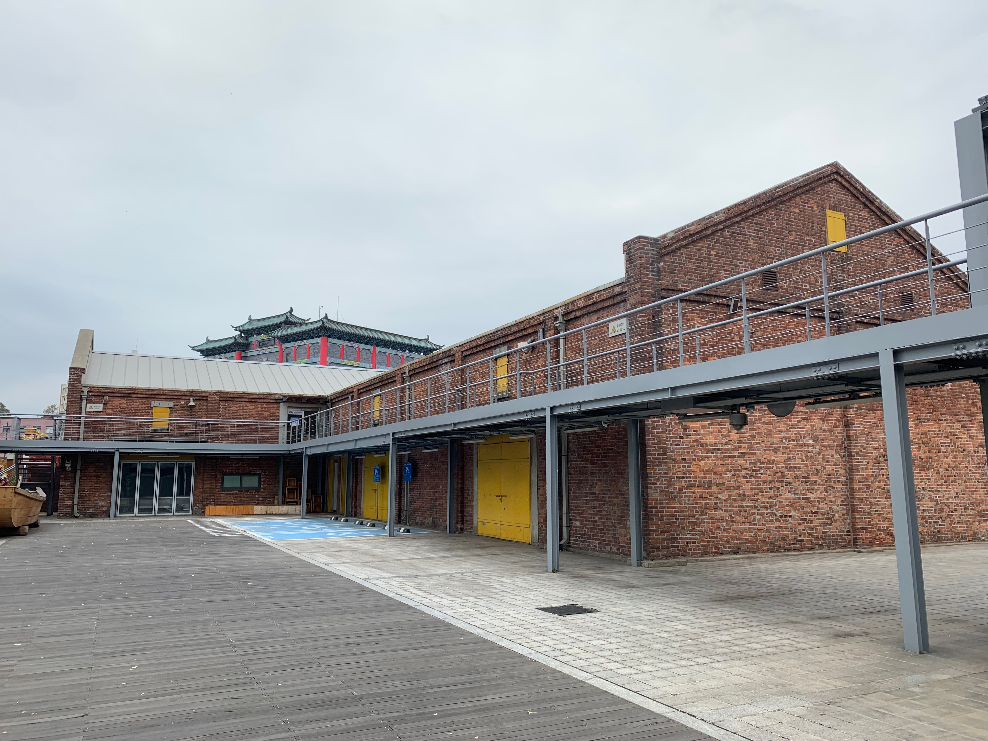 인천아트플랫폼(옛 대한통운 창고)